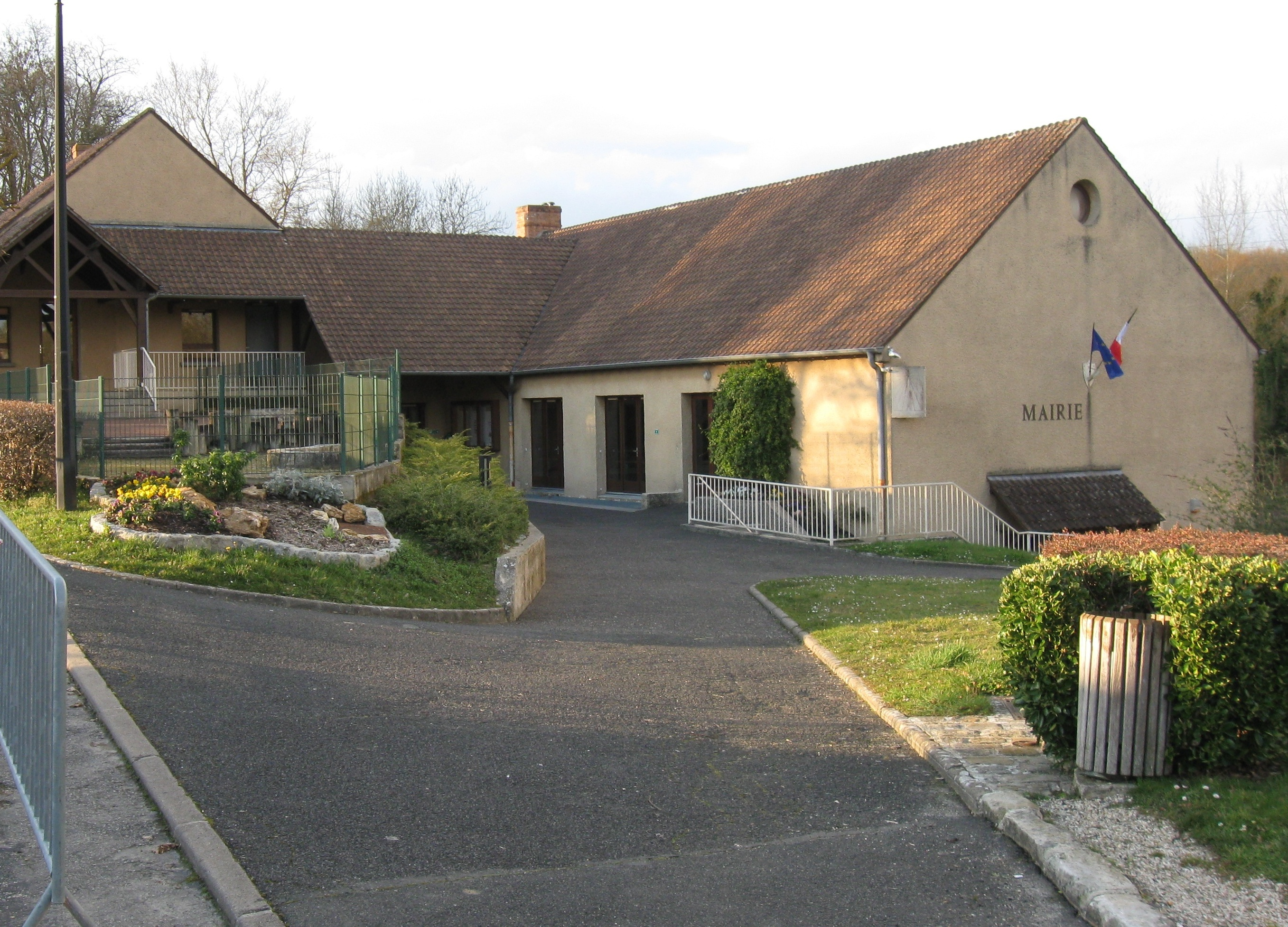 Mairie de Saint-Sauveur-sur-École. (Seine-et-Marne, région Île-de-France).